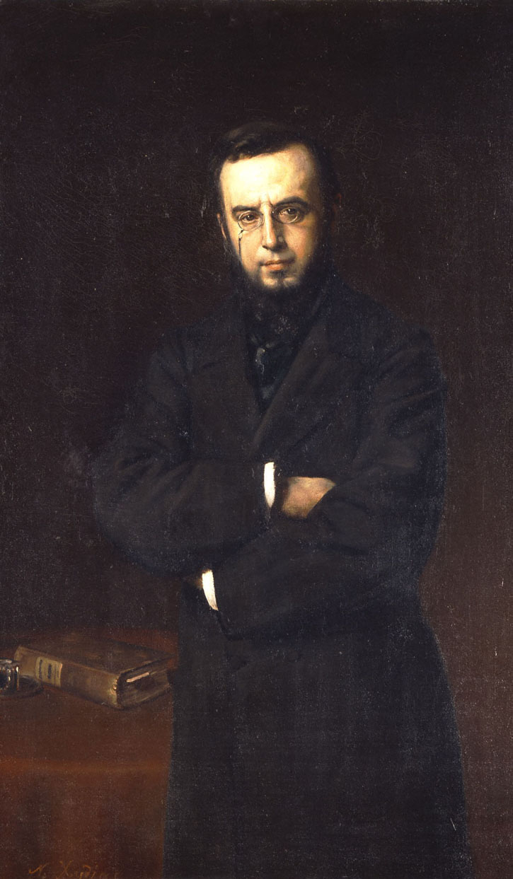 Προσωπογραφία Δημητρίου Βικέλα Λάδι σε μουσαμά, 130 x 79 cm Εθνική Πινακοθήκη-Μουσείο Αλεξάνδρου Σούτζου, Δωρεά Κλεοπάτρας Καυταντζόγλου και Σοφίας Σαριπόλου, Αρ. έργου: Π.1674